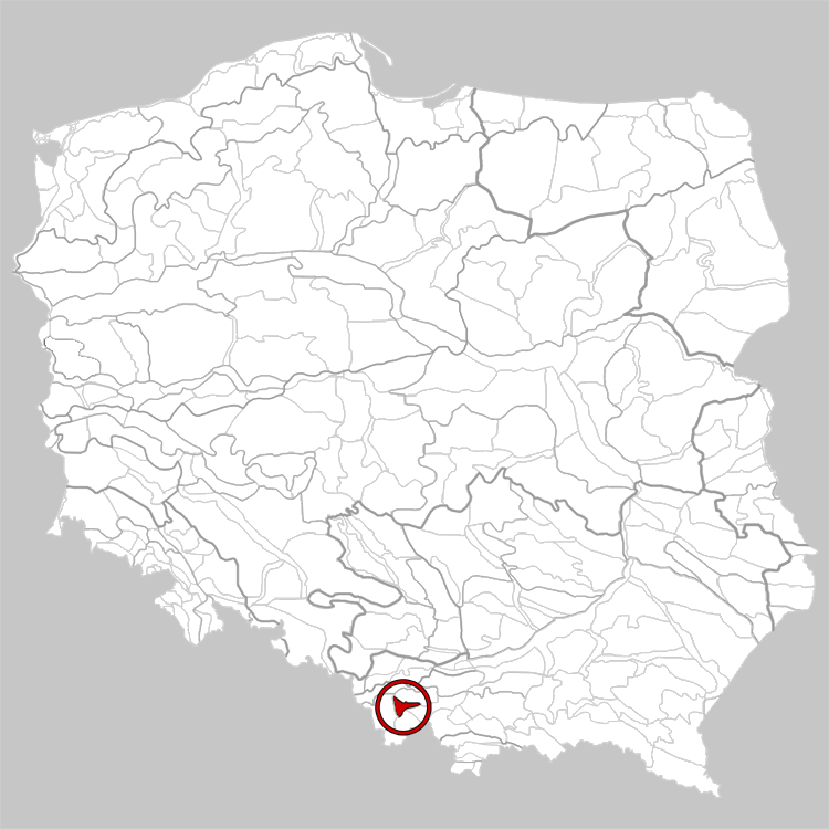 Physico-geographical regionalization of Poland Mezoregion 513.46 Żywiec Basin Regionalizacja fizycznogeograficzna Polski Mezoregion 513.46 Kotlina Żywiecka